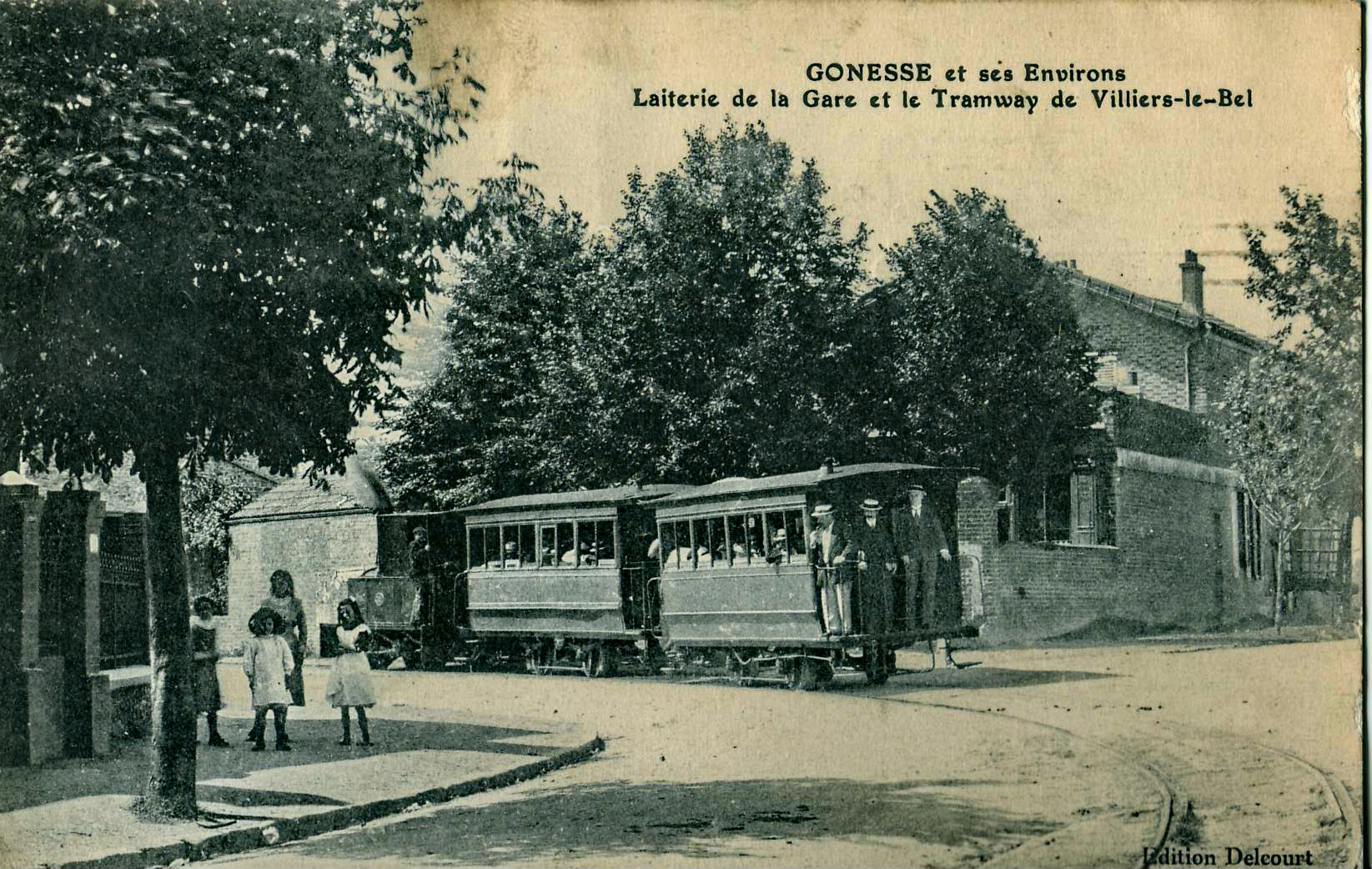 Carte postale ancienne éditée par Delcourt : GONESSE et ses environs : Laiterie de la Gare et le Tramway de Villiers-le-Bel